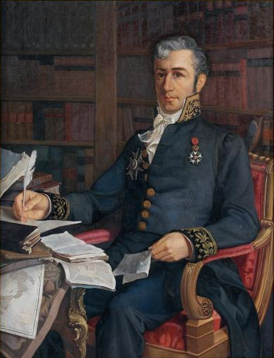 Portrait de Camille de Tournon-Simiane - 1778 - 1833